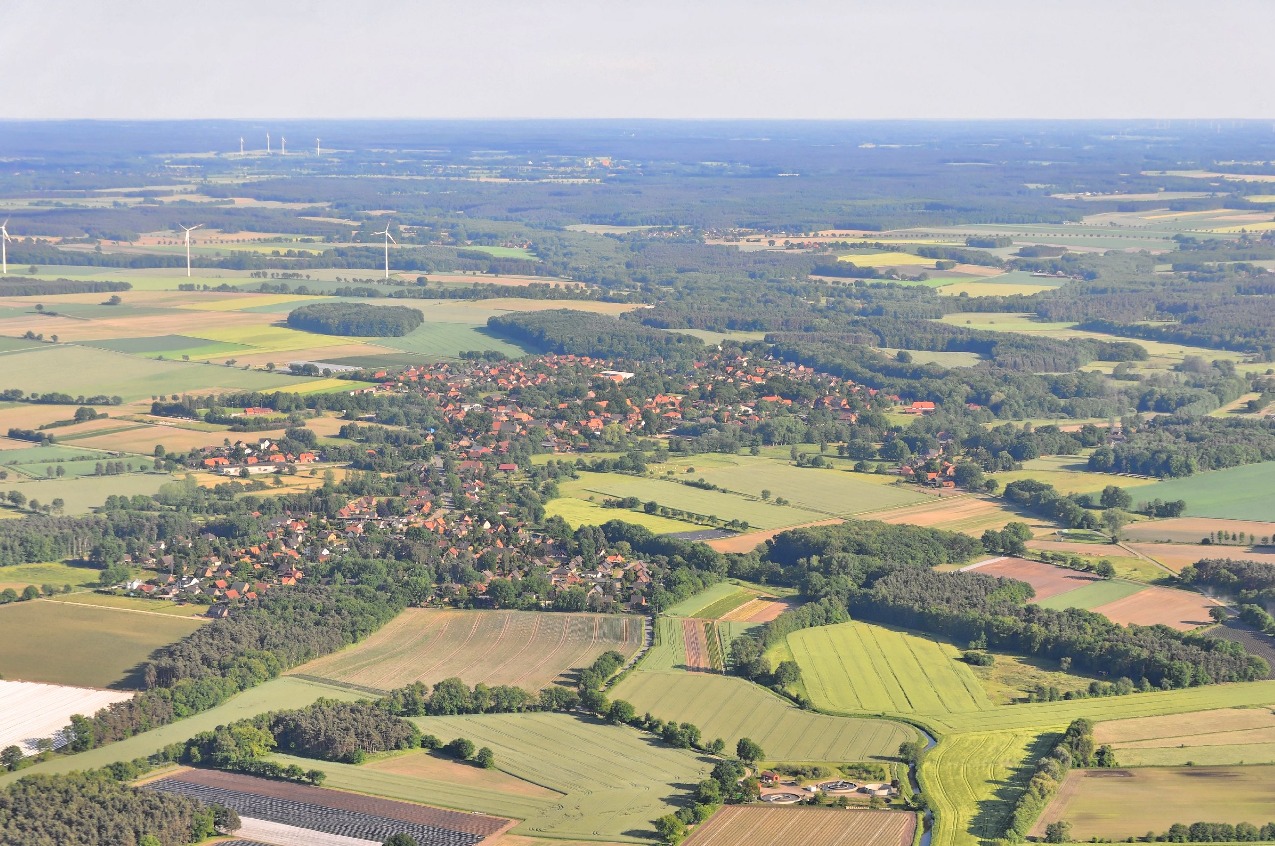 Blick auf den Ort Neetze in Richtung Süden. Vorn rechts der Fluss Neetze. Überführungsflug vom Flugplatz Nordholz-Spieka über Lüneburg, Potsdam zum Flugplatz Schwarzheide-Schipkau